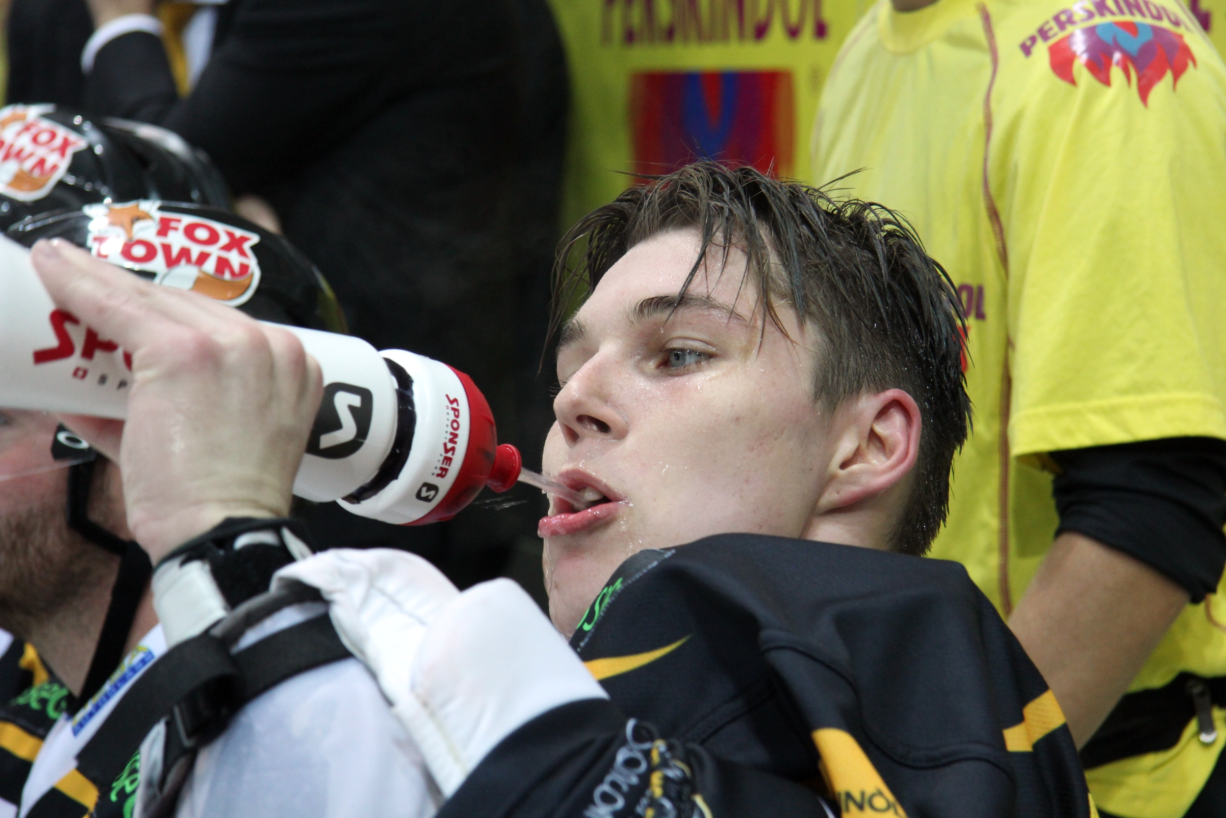 Elvis Merzlikins (L 30).